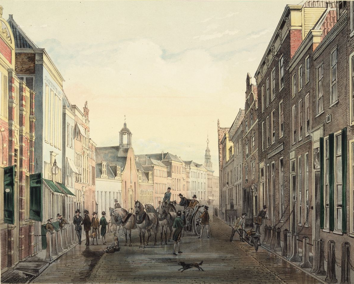 Serie stadsgezichten "Leyden". De Breestraat bij Minerva. Ca 1850